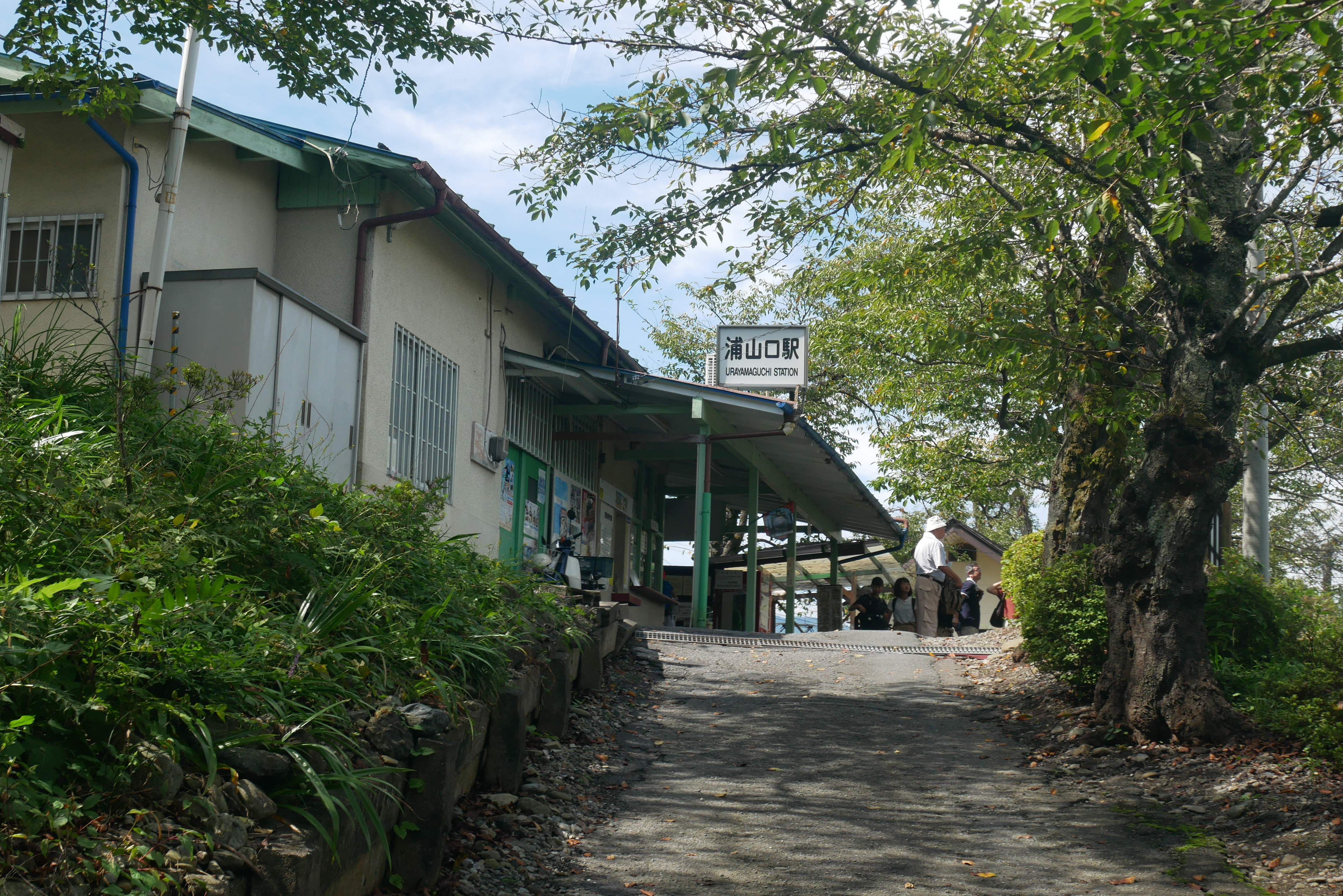 Urayamaguchi Station (浦山口駅)